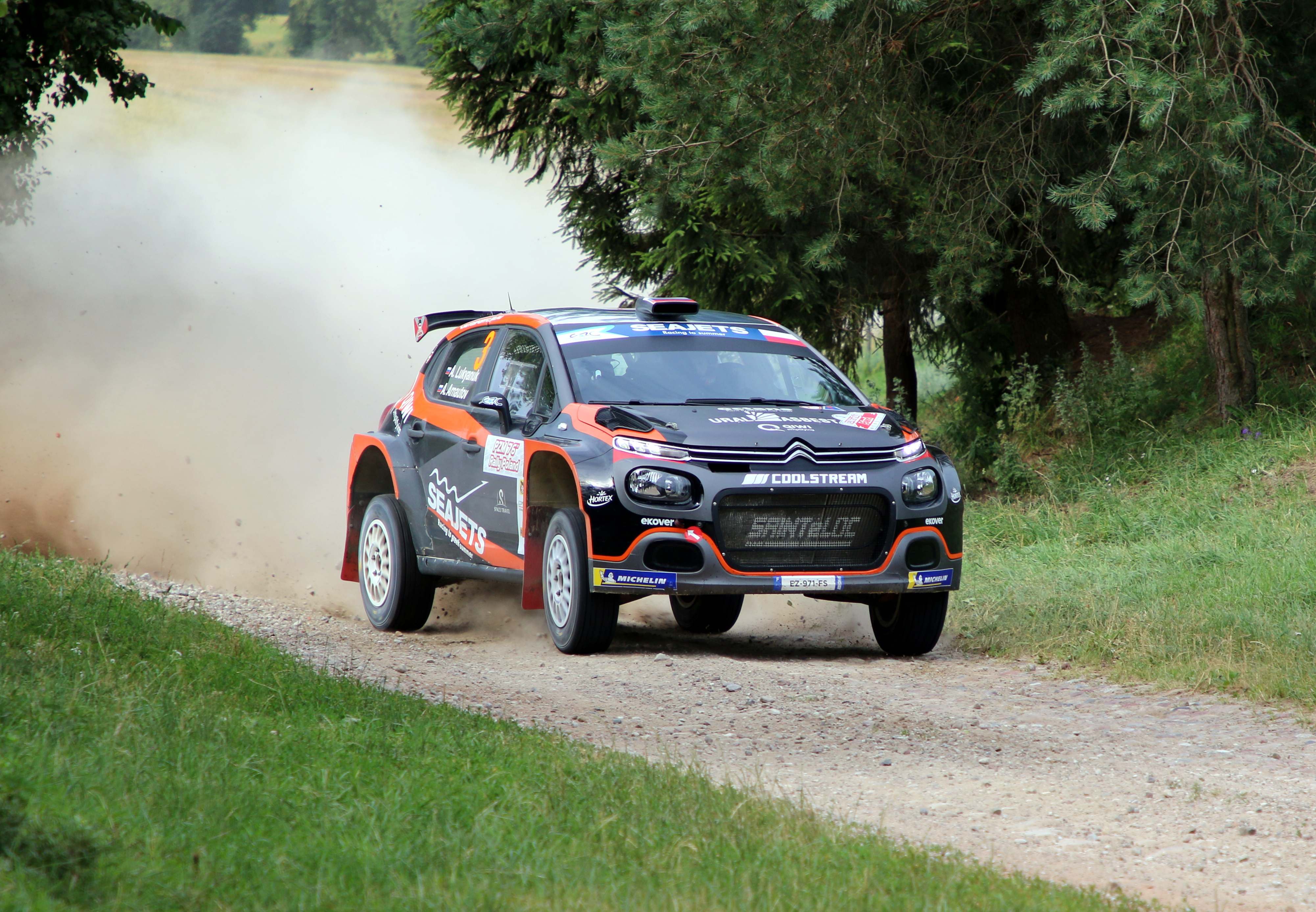 Aleksiej Łukjaniuk podczas Rajdu Polski 2019